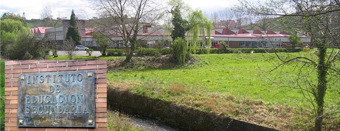 Instituo de Educación Secundaria de Noreña.